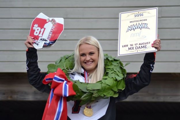 Genette Våge, Norgesmester 2015